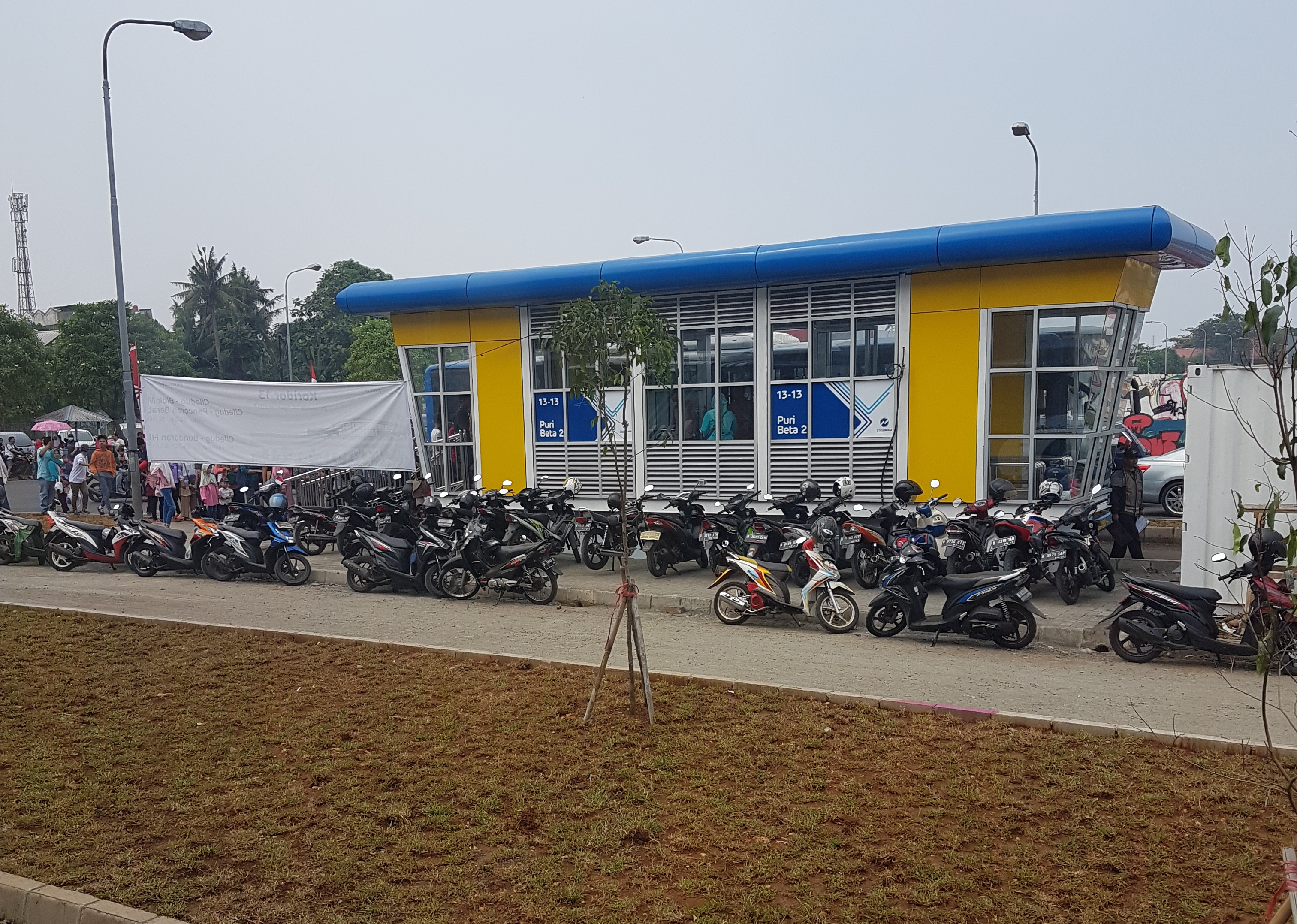 Stasiun BRT Puri Beta 2 di Kota Tangerang